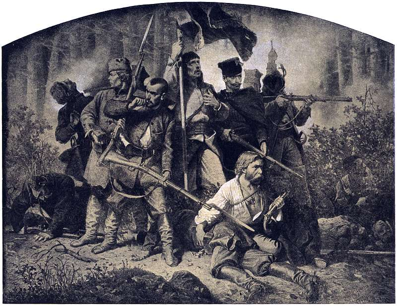 Cykl "Polonia", IV. Bitwa by Artur Grottger